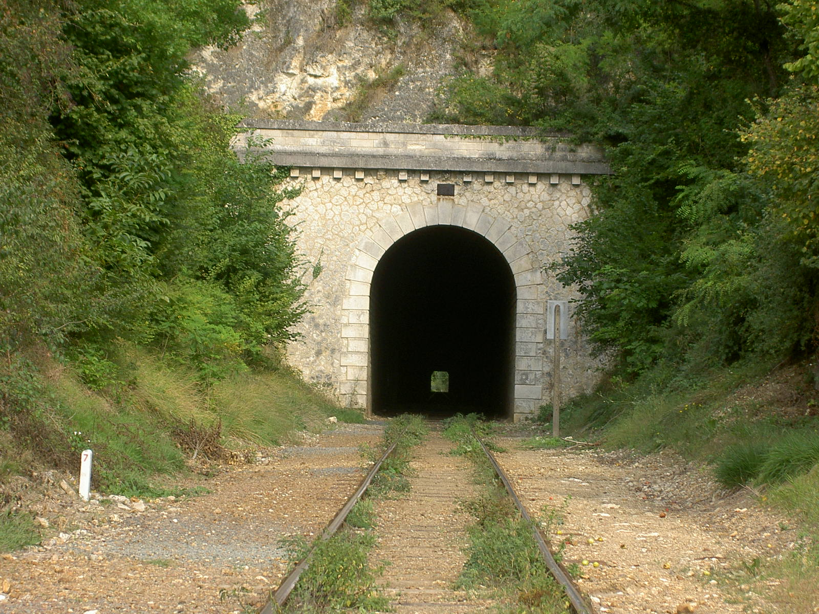 photo prise de titeufgirl17 ce jour